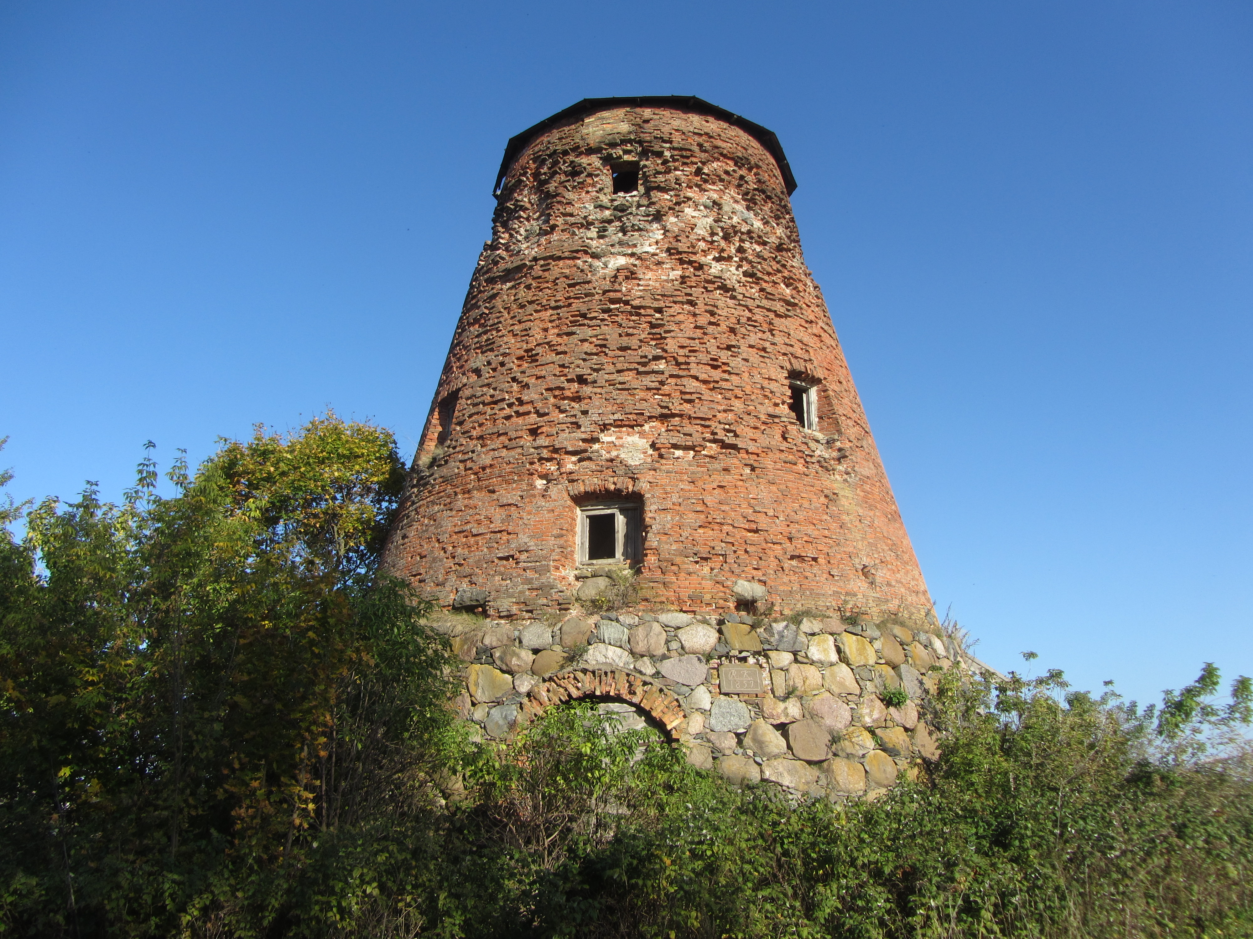 Pandėlys, Lithuania